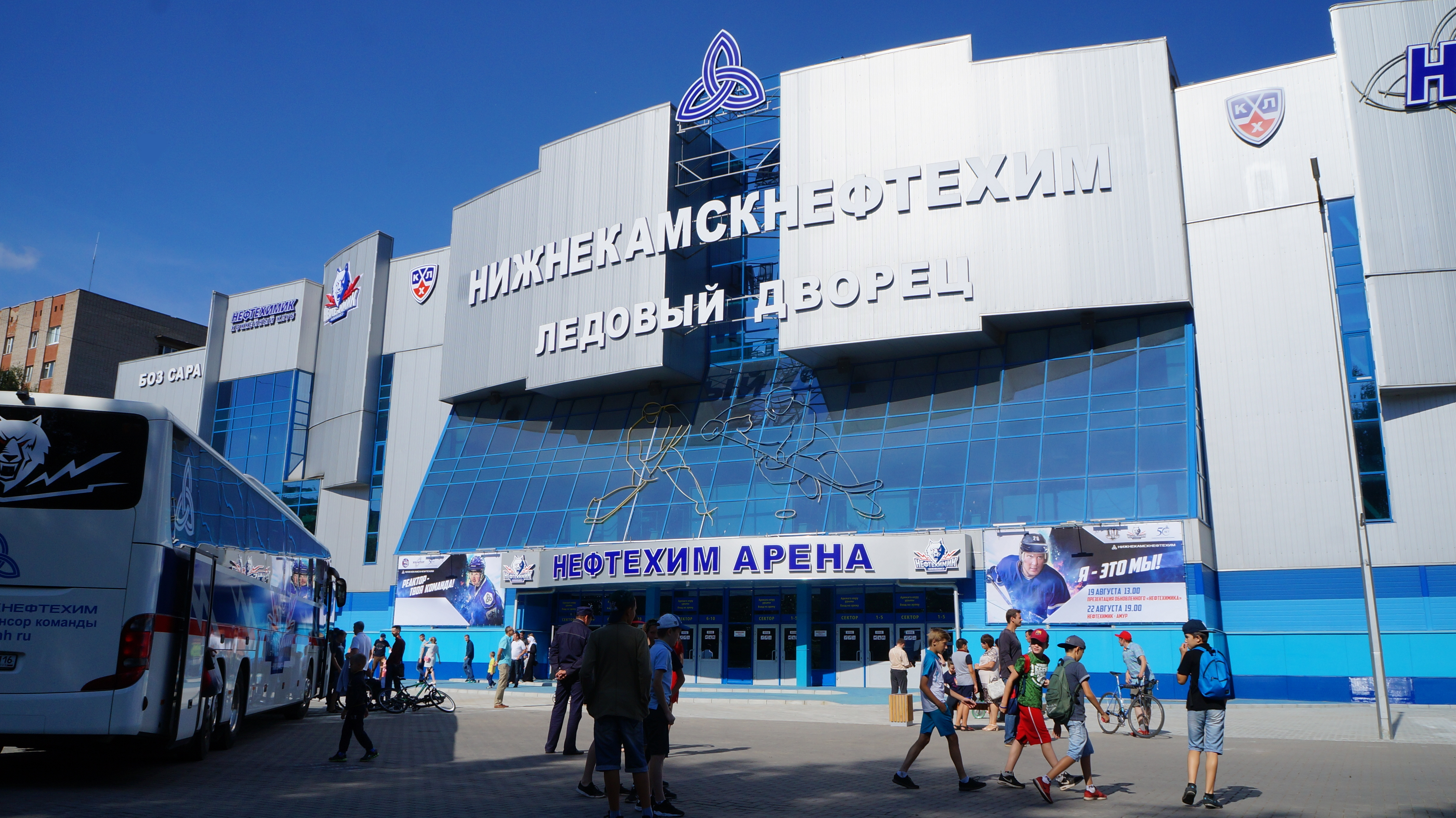 Домашняя арена ХК "Нефтехимик"